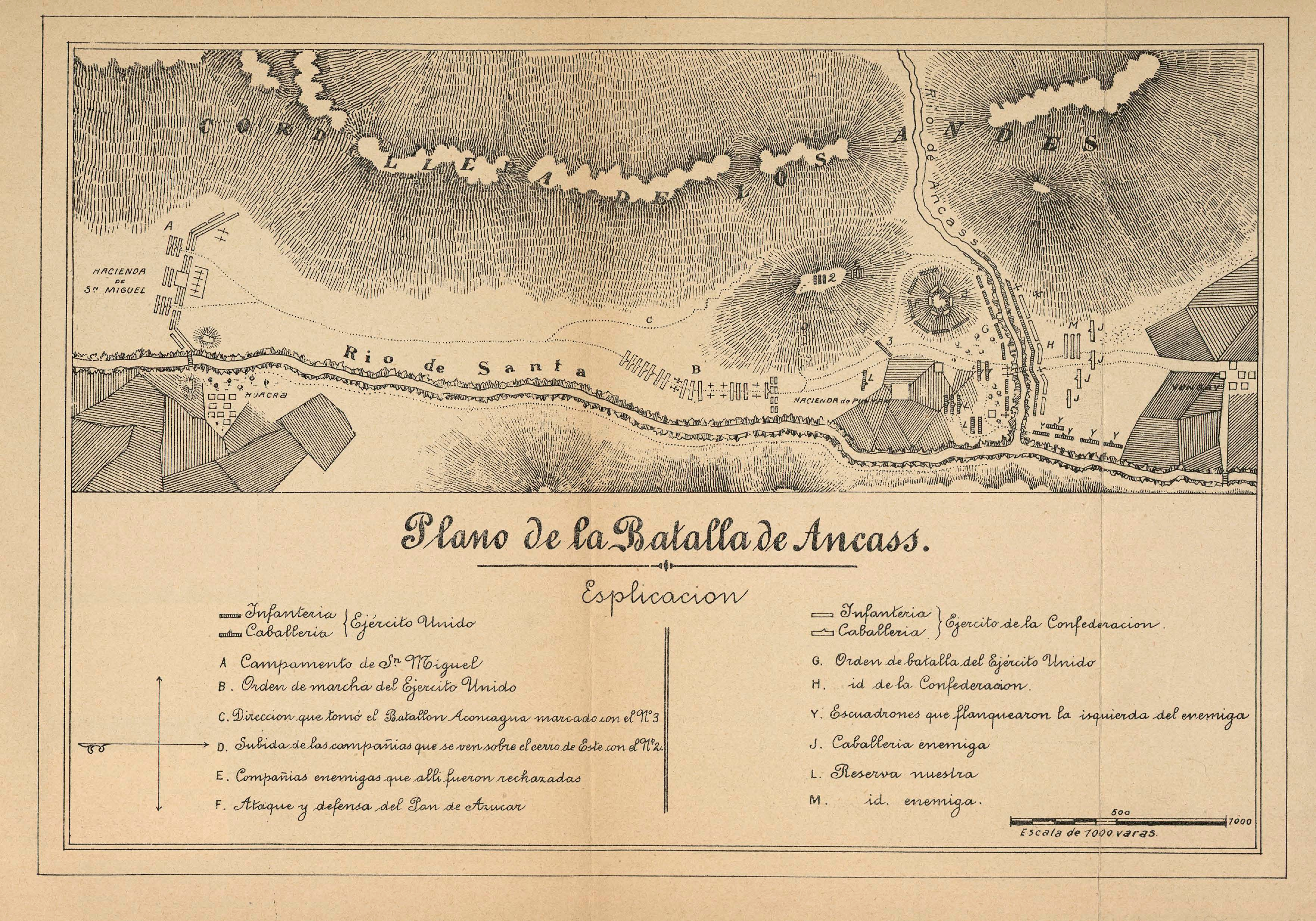 Plano de la Batalla de Yungai. Trazado por el Sarjento Mayor D. Francisco José Cañas.